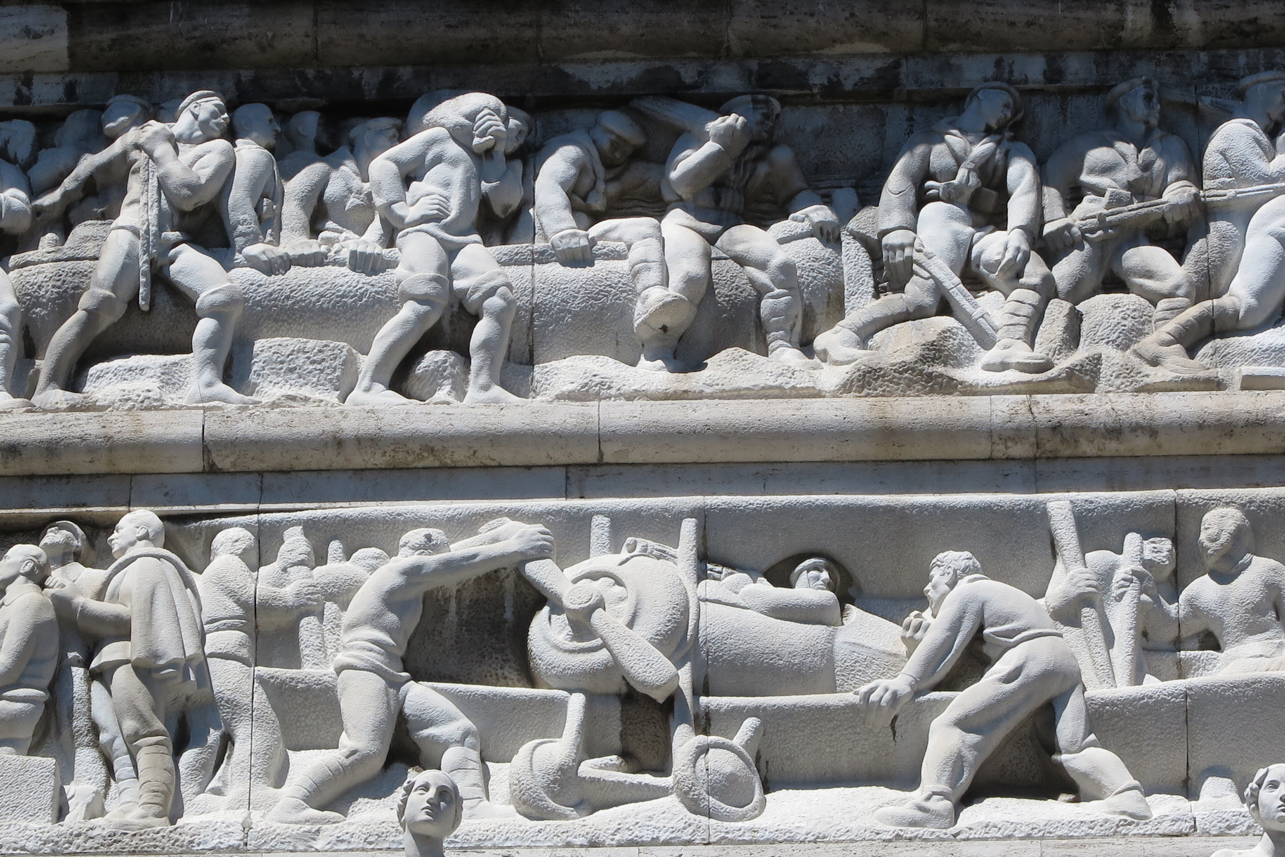 Arco dei Caduti di Piazza della Vittoria (particolare) This is a photo of a monument which is part of cultural heritage of Italy.